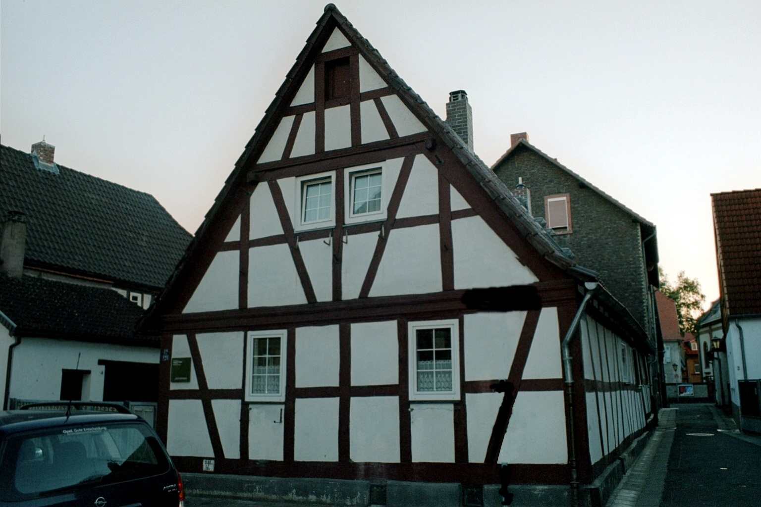 Geburtshaus von August Gaul in D-63457 Hanau-Grossauheim